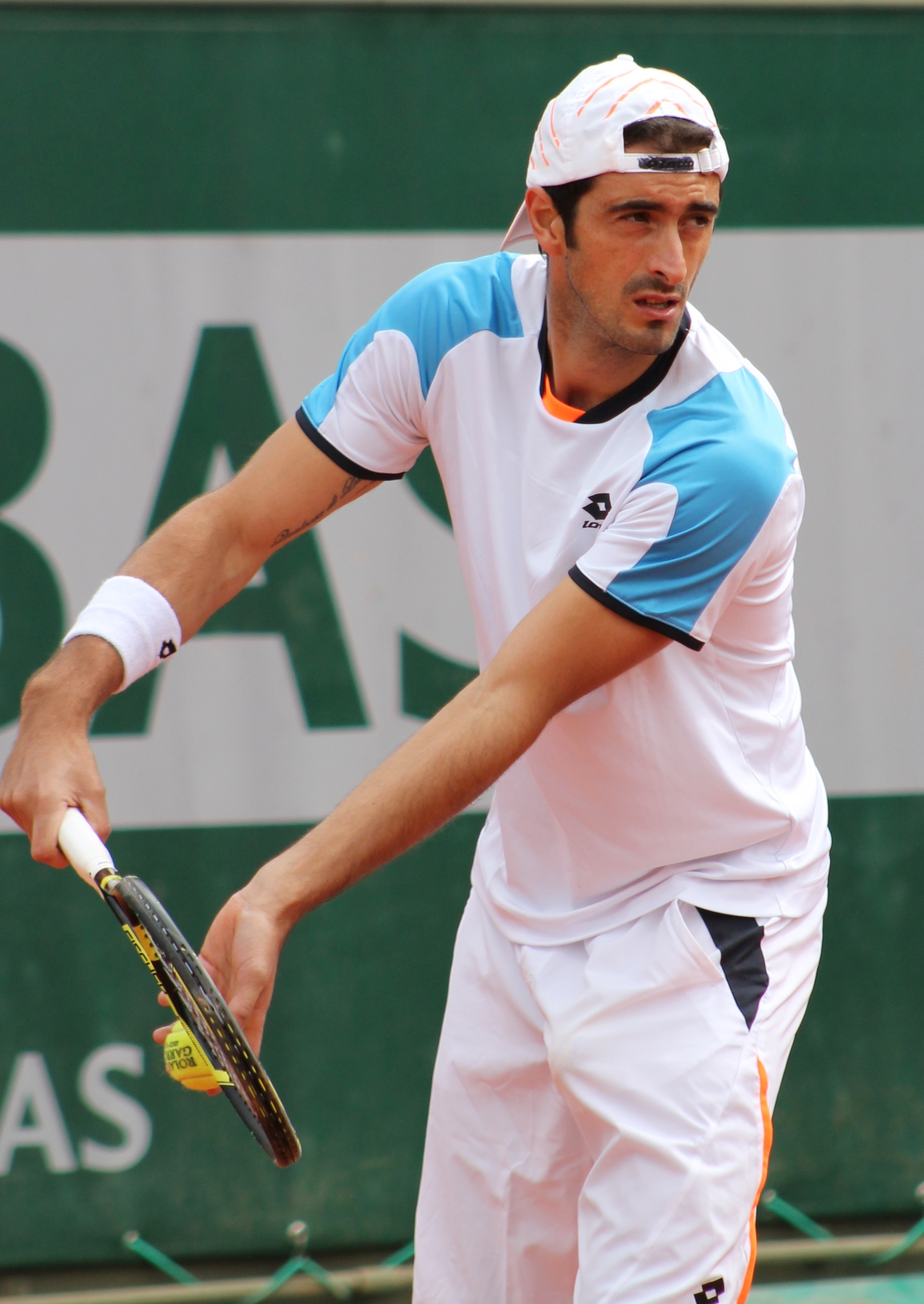 Starace RG13